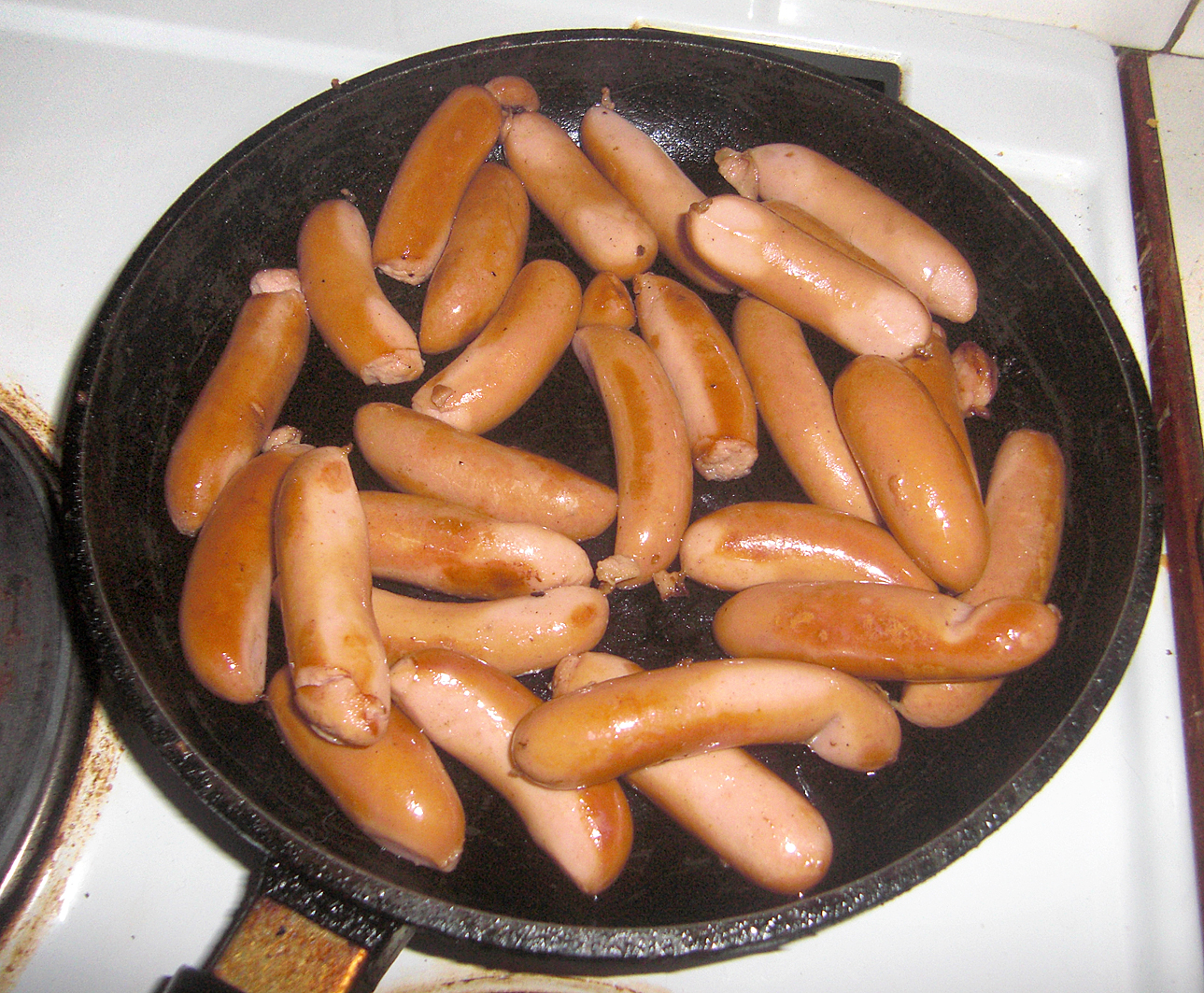 Prinskorvar som steks i en stekpanna i Västra Frölunda, Göteborg, Västra Götalands län, Sverige. Prinskorv är vanligt förekommande på det svenska julbordet.